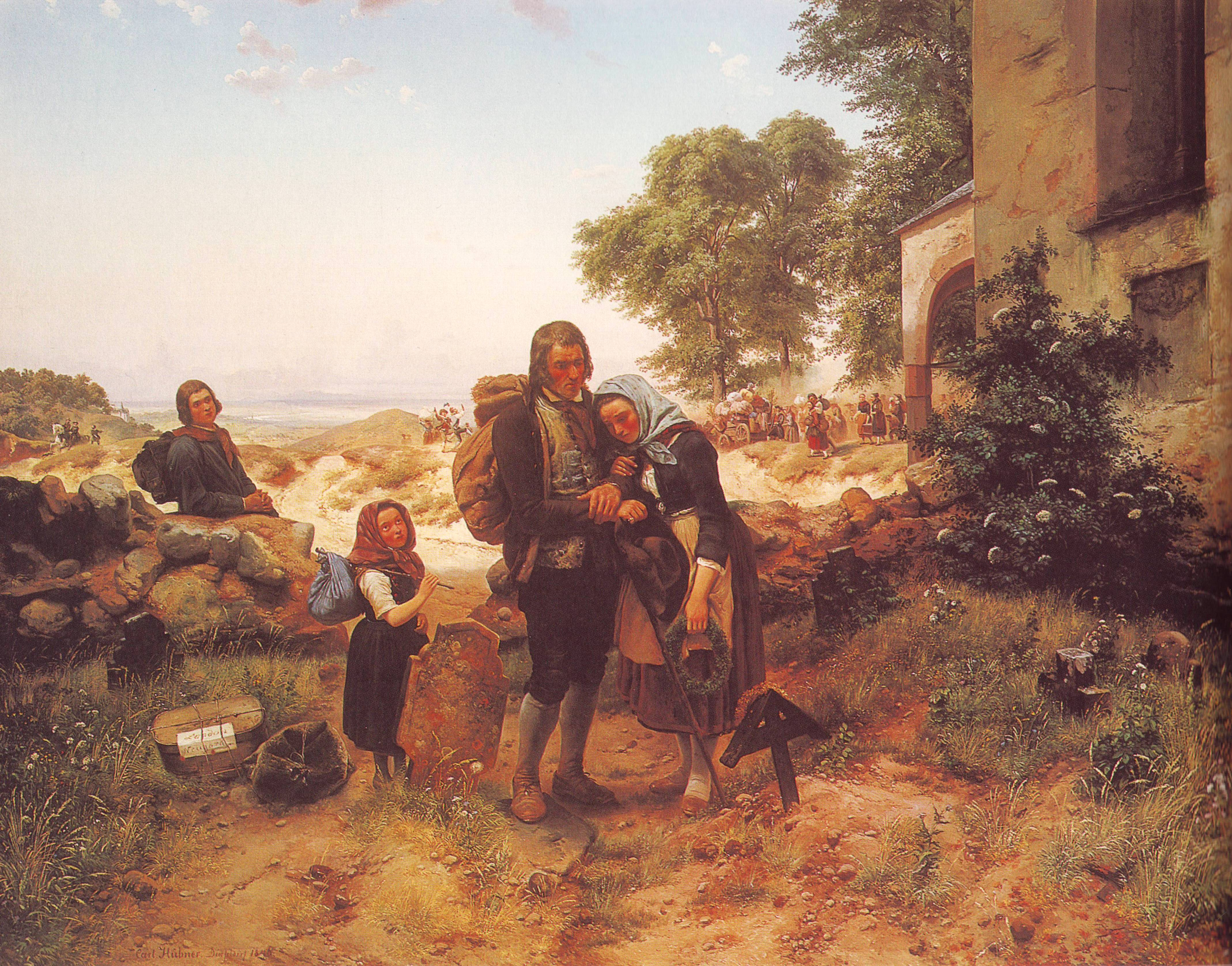 Öl auf Leinwand, Carl Wilhelm Hübner, 1846. “Deutsche Auswanderer”